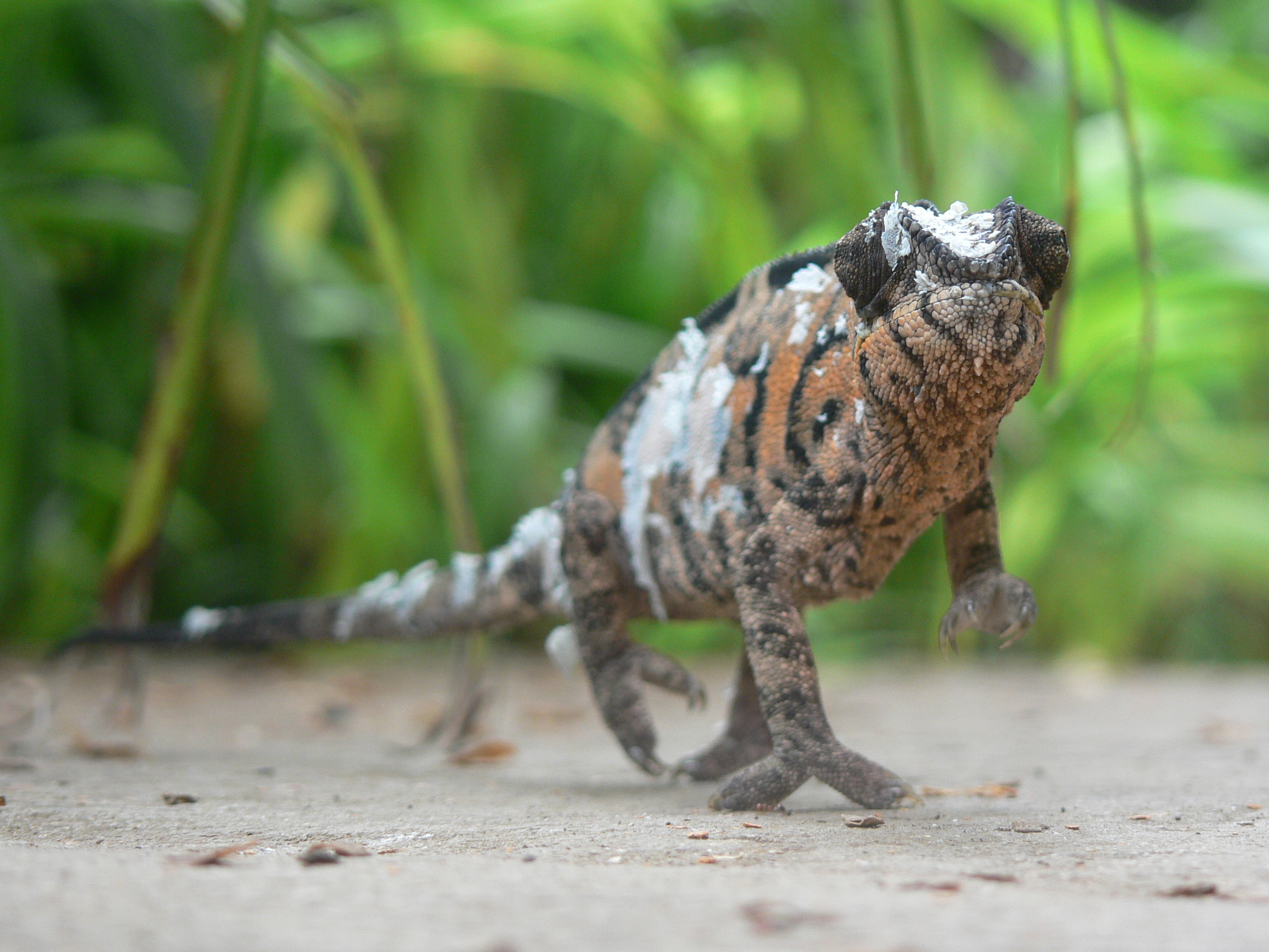 Furcifer pardalis